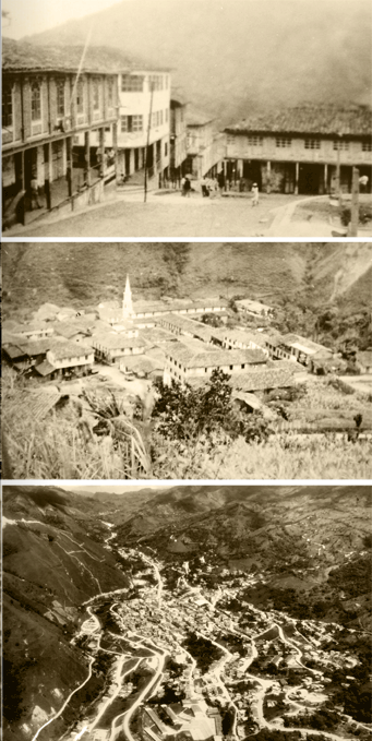 Piñas en antaño.